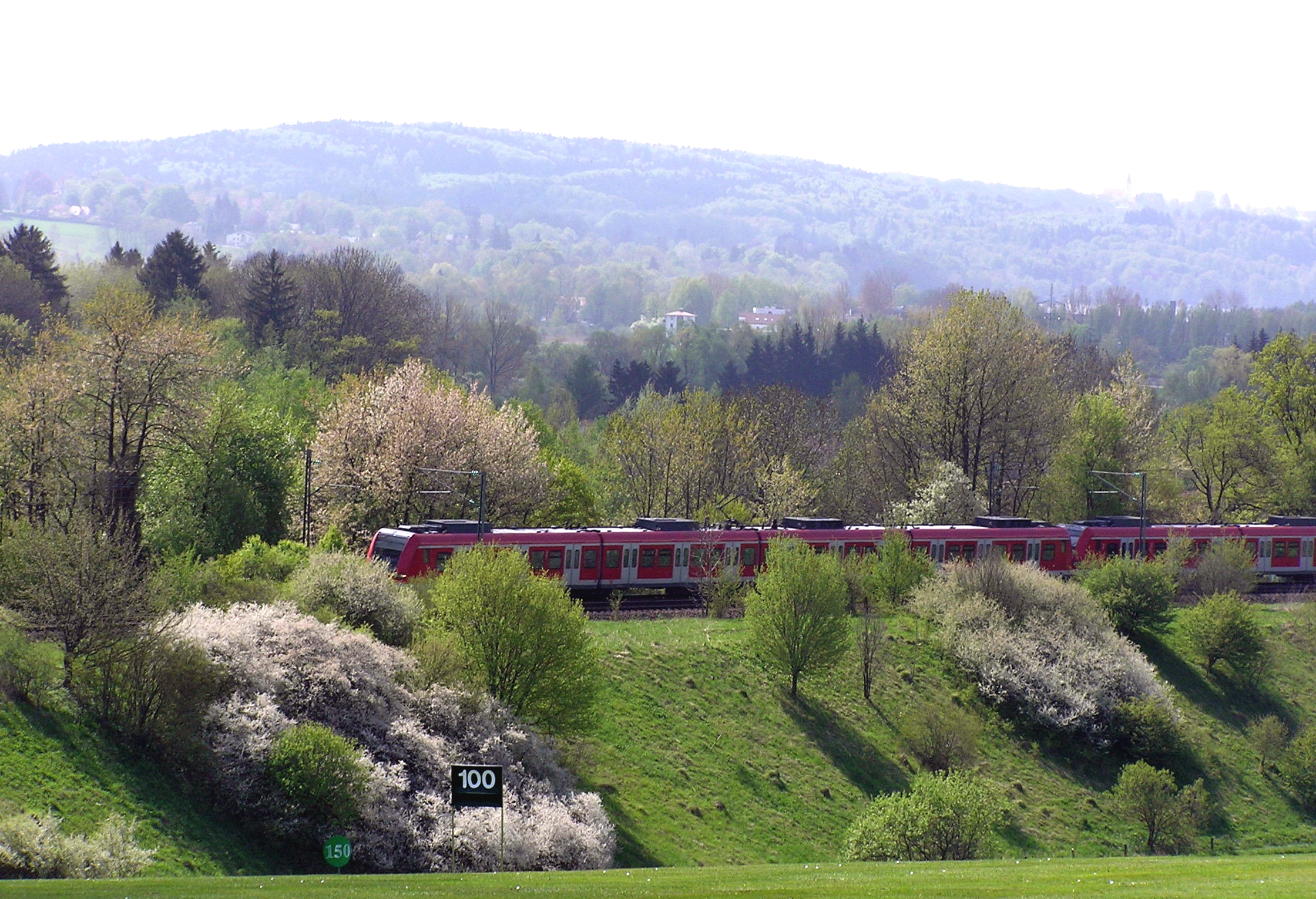 Starnberg-Rieden. Bahntrasse in der Nähe des ehemaligen Bahnhofs Mühlthal.